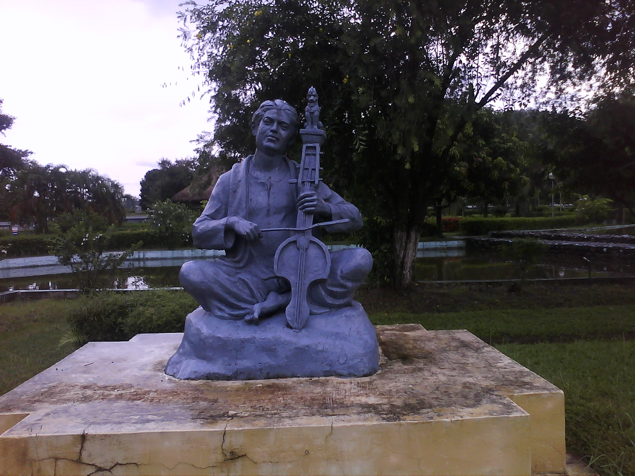 অসমীয়া: শ্ৰীমন্ত শংকৰদেৱ কলাক্ষেত্ৰৰ এক দৃশ্য